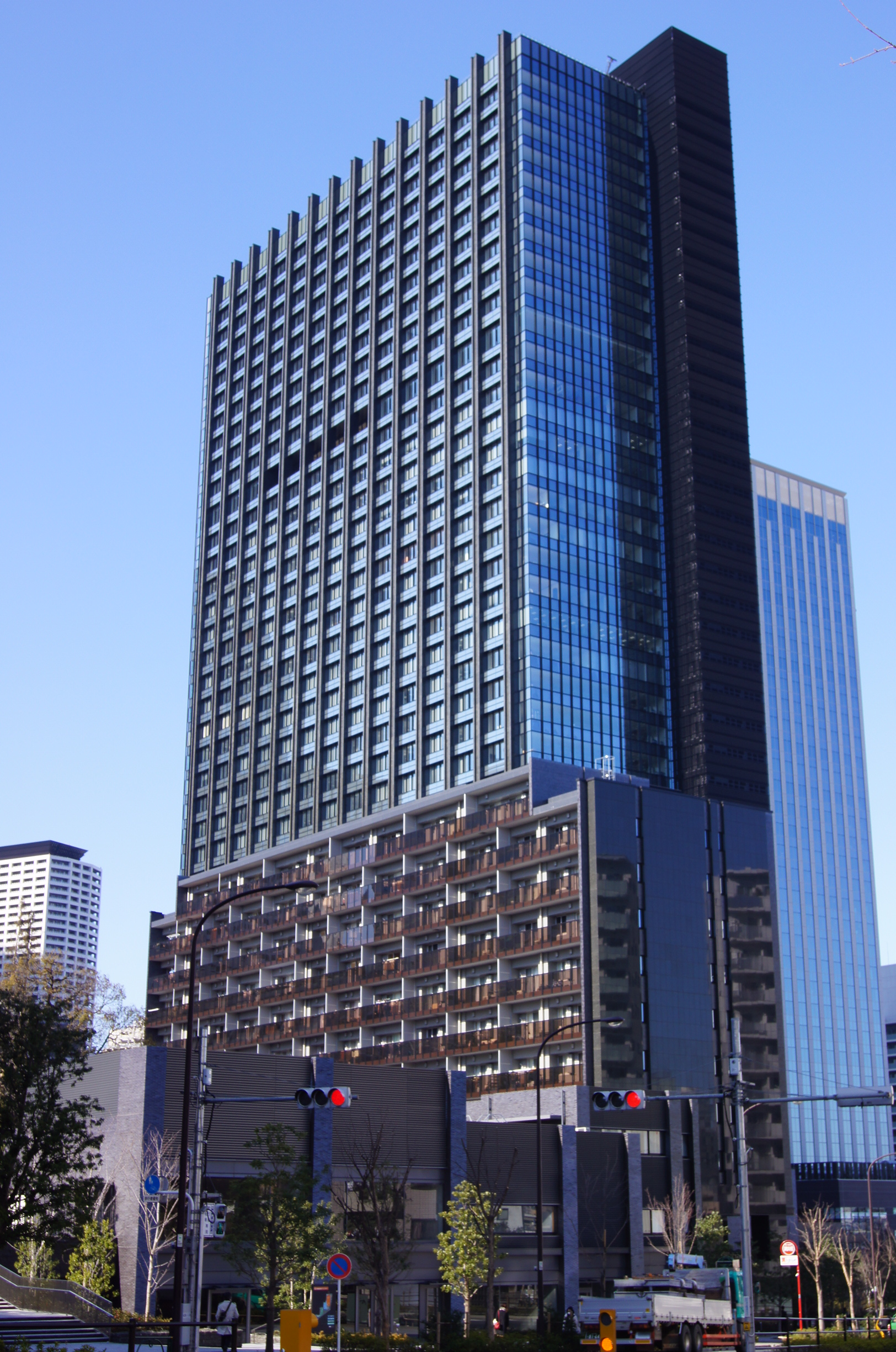 新宿グランドタワーを北東側から撮影したもの